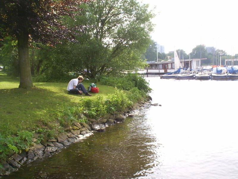 Grünzug an der Alster in St. Georg.